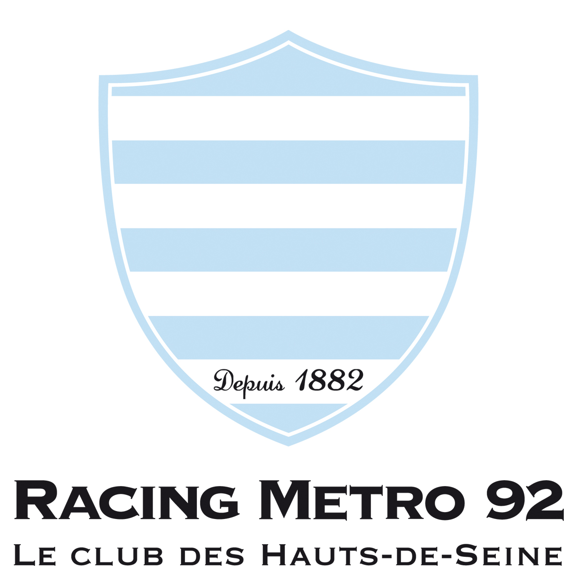 Logo Racing Metro 92